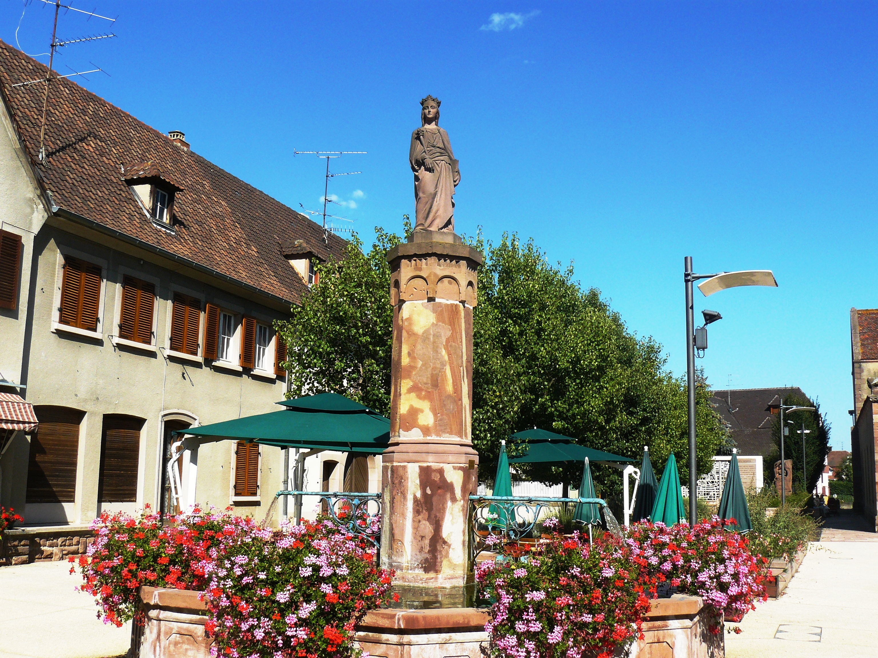 Fontaine de la Vierge - Sigolsheim (Haut-Rhin)